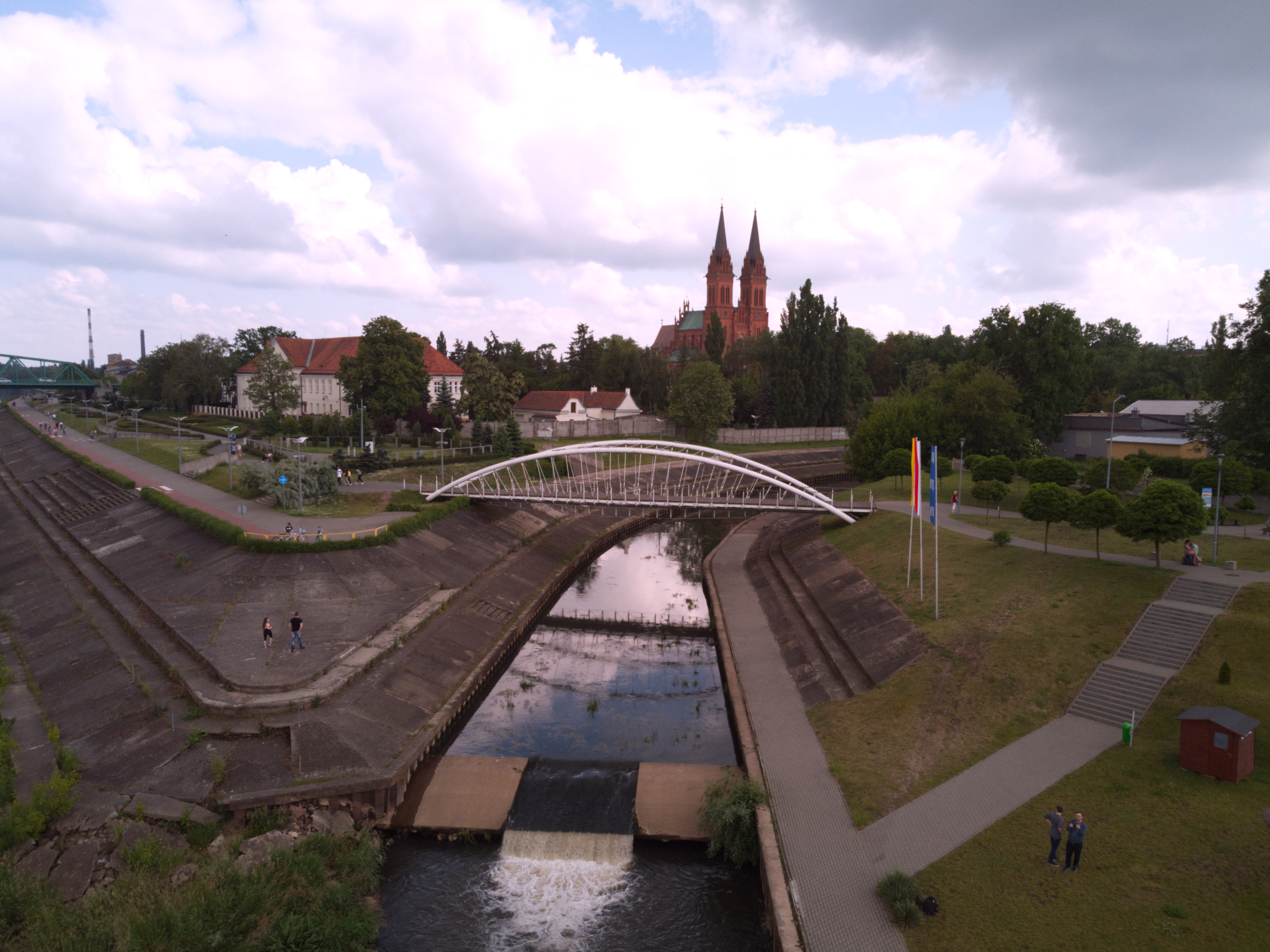 Ujście Zgłowiączki do Wisły (2020 r.)